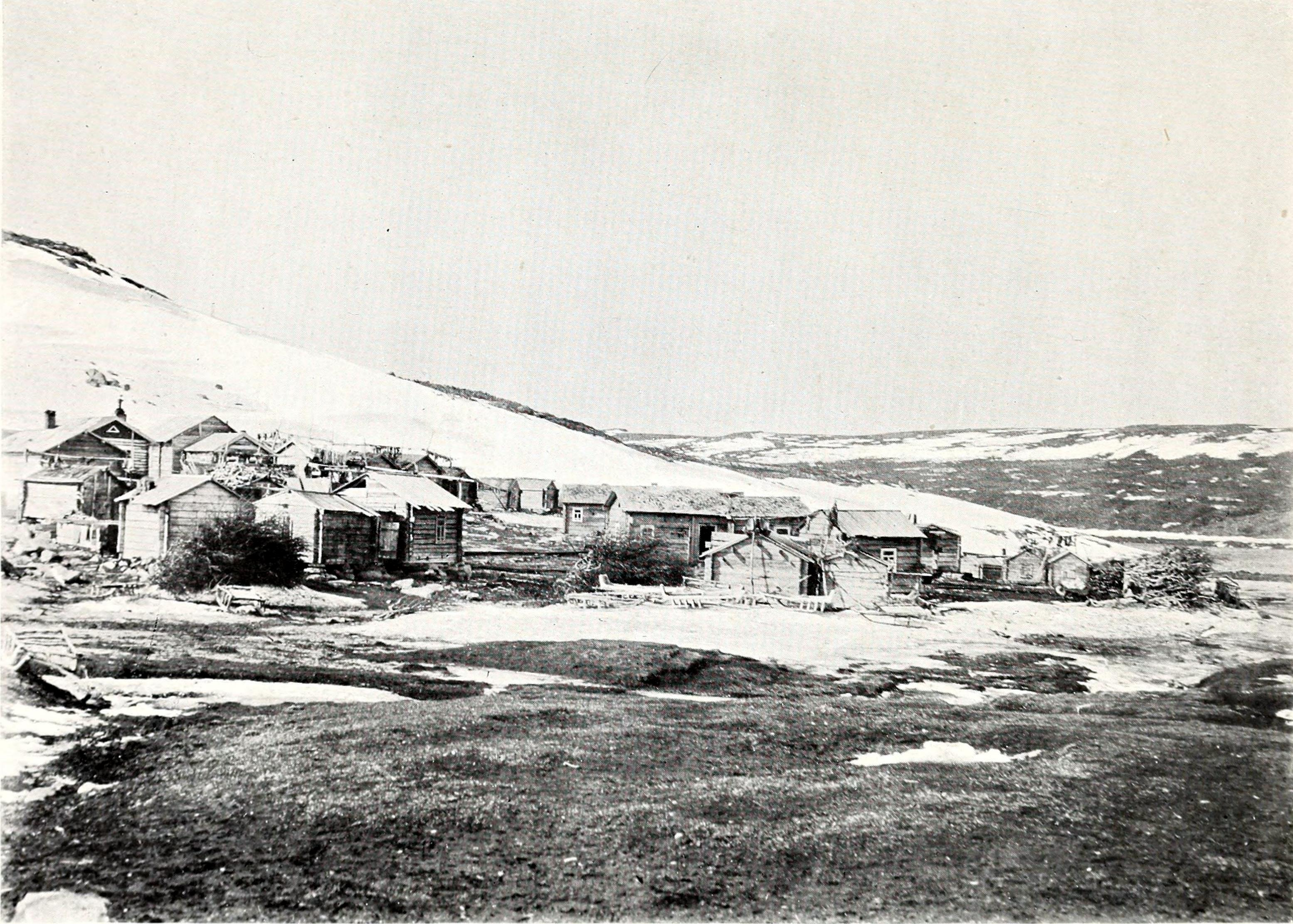 / z .